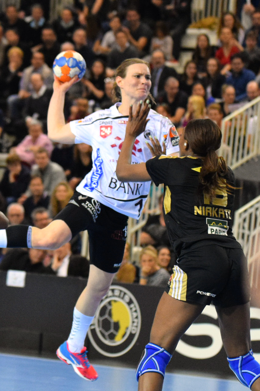 Jette Hansen Le 03 avril 2016 lors du match aller de demi-finale de la Coupe des vainqueurs de coupe de handball Issy Paris Hand / Team Tvis Holstebro